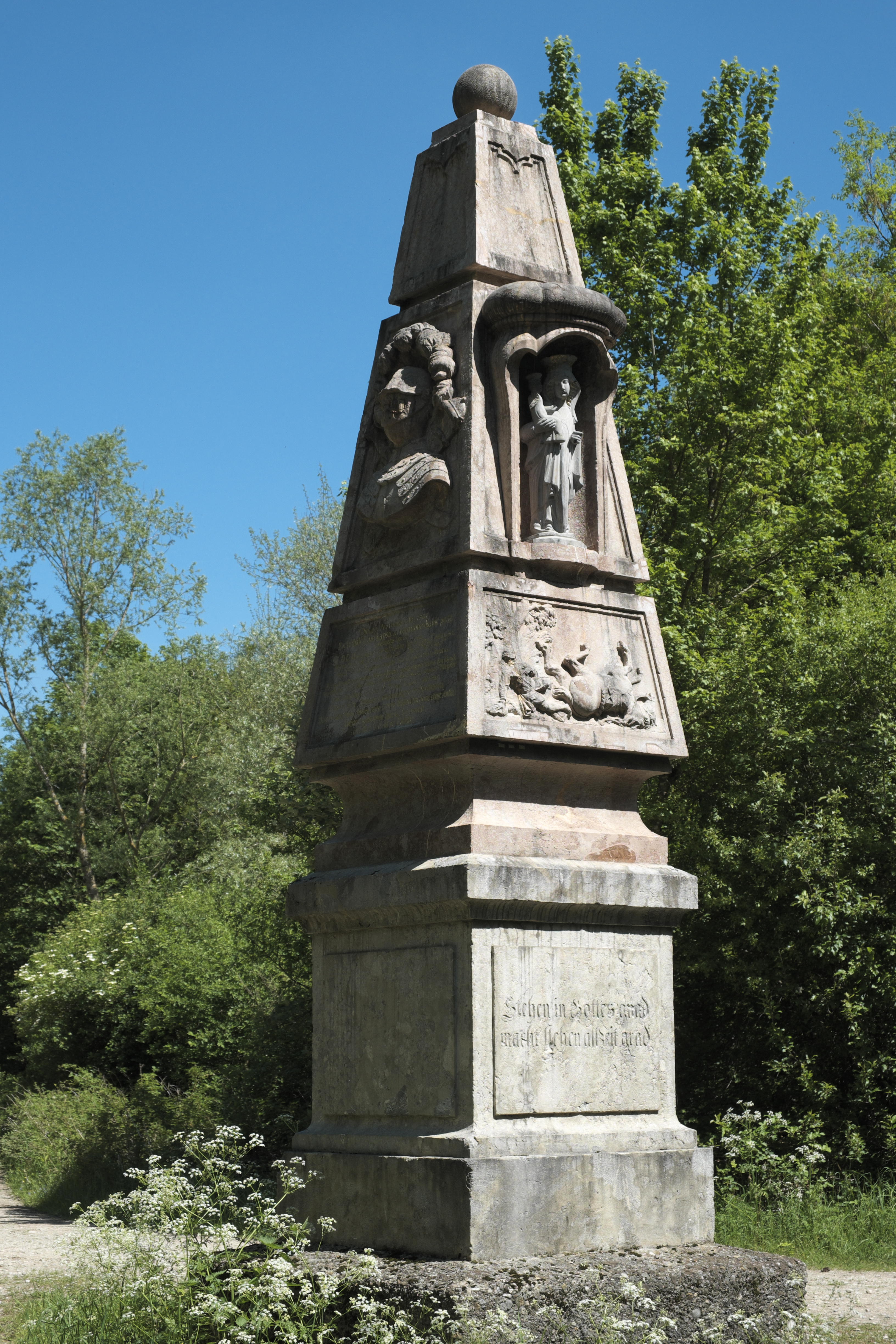 Preysingsäule im Forst Kasten in der Gemeinde Neuried (bei München) im Landkreis München (Bayern, Deutschland)